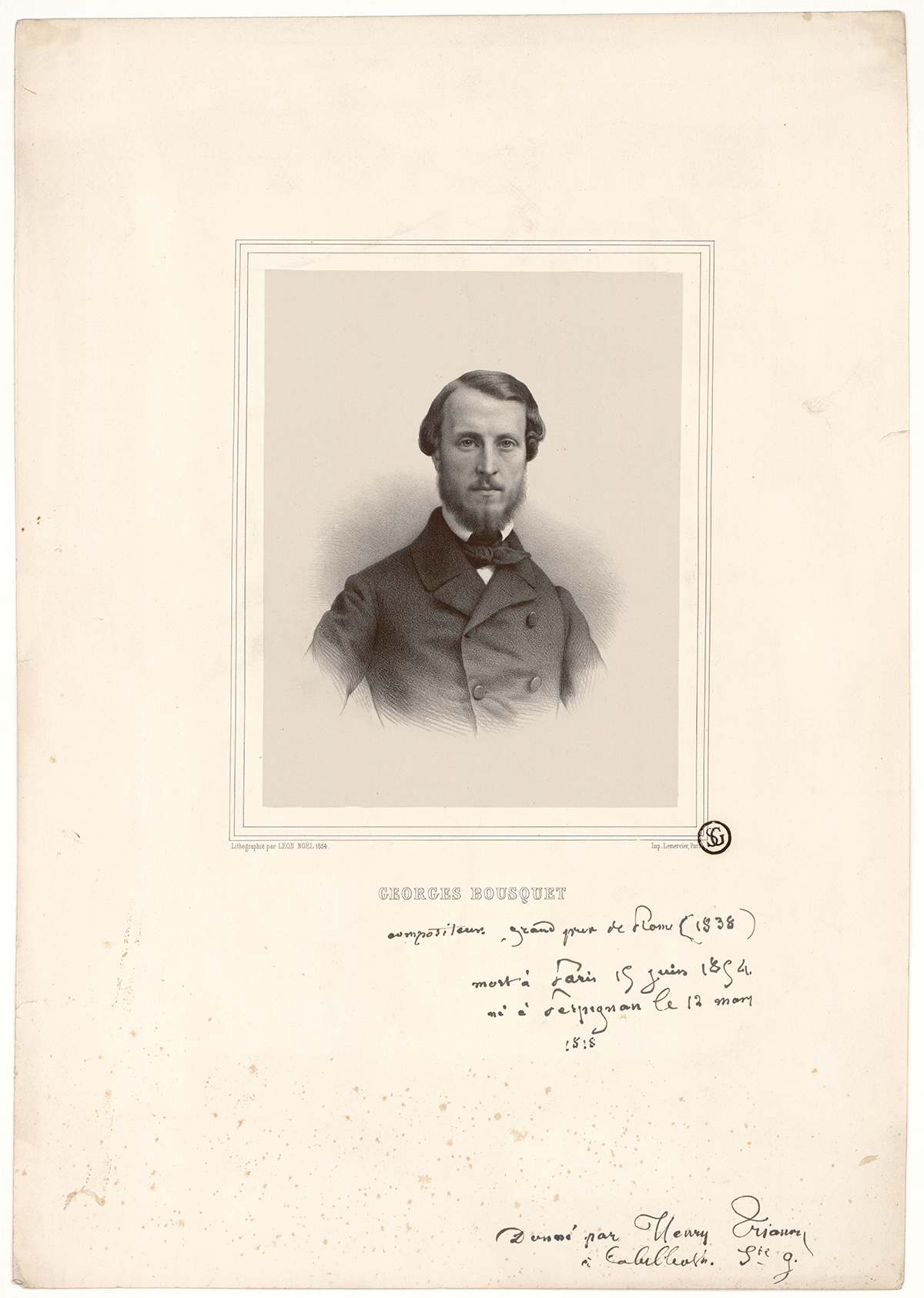 Portrait de Georges Bousquet en 1854 (lithographie de Léon Noël). Image annotée ("Donnée par Henri Trianon à..."). Henri Trianon est le librettiste d'un de ces deux derniers opéras (inédit et non localisé à ce jour).